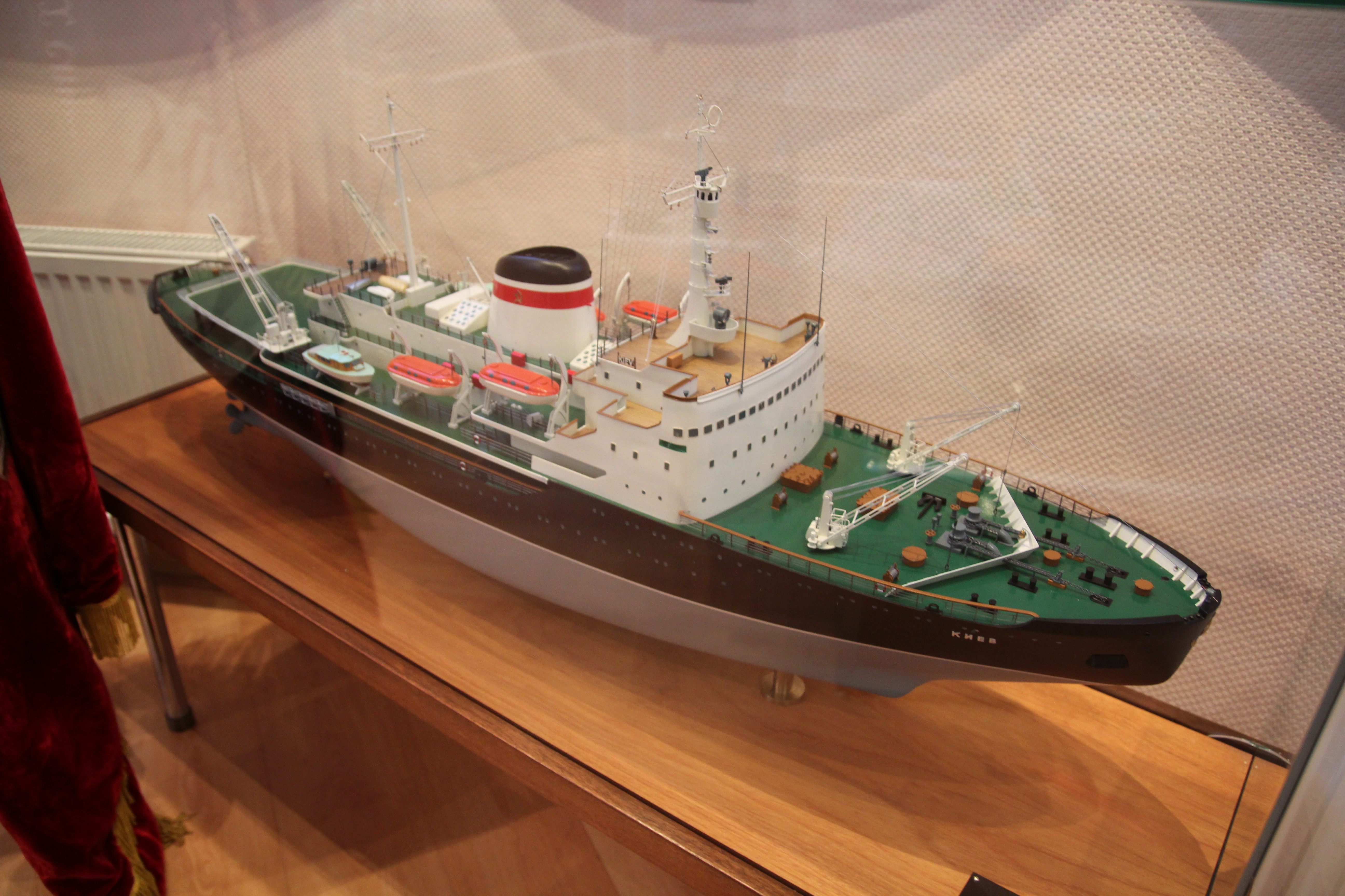 Модель судна Киев